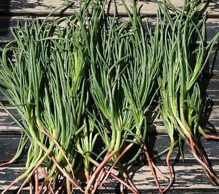 Agretti (Salsola soda)